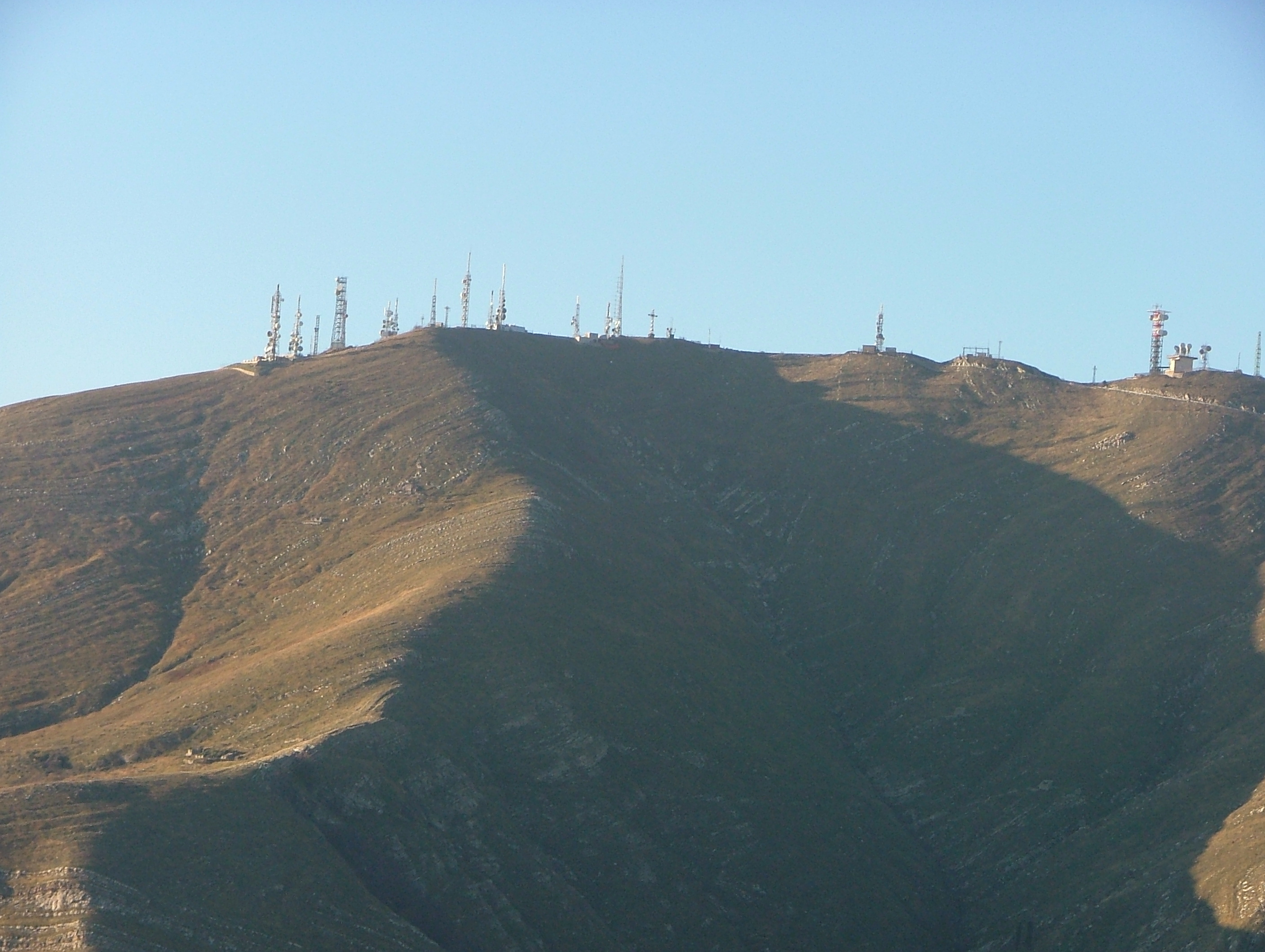 Il monte fasce visto da Sessarego, frazione di Bogliasco